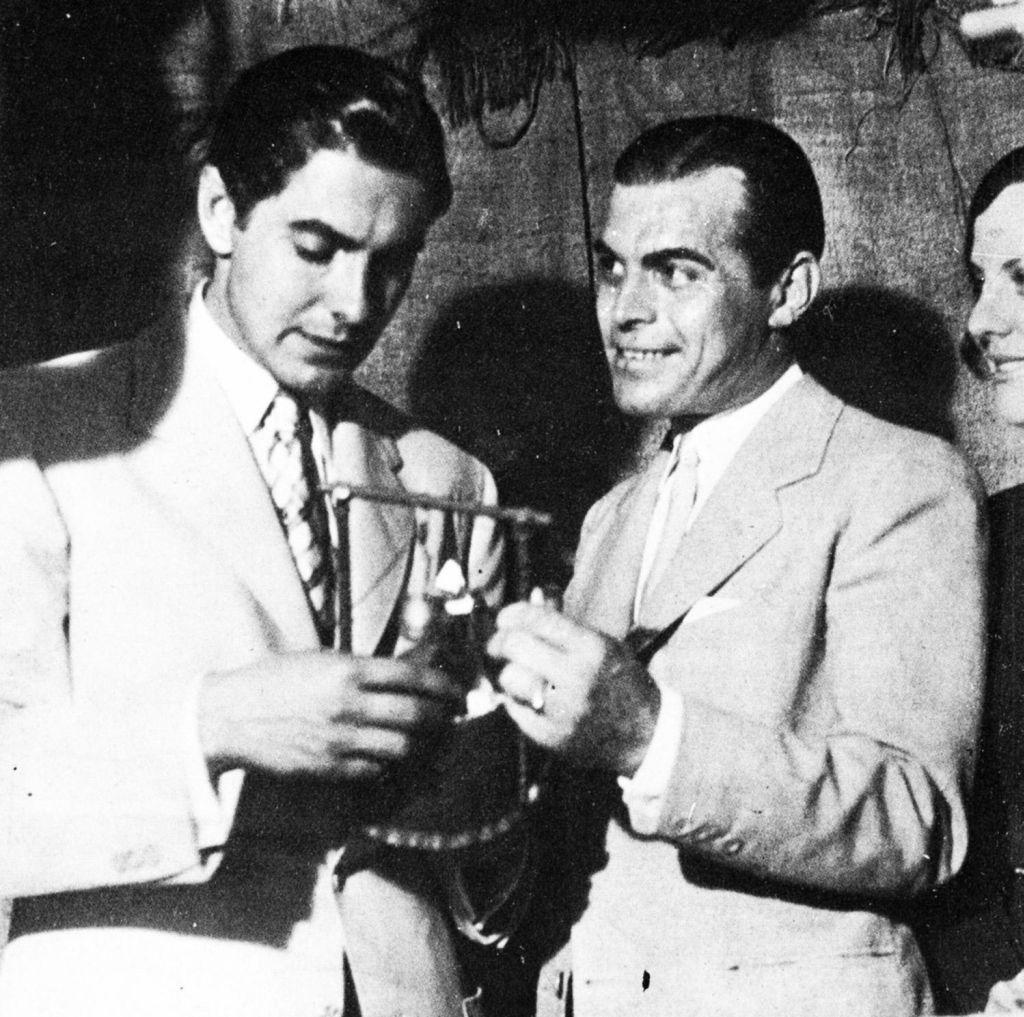 Los actores Tyrone Powery y José Gola.